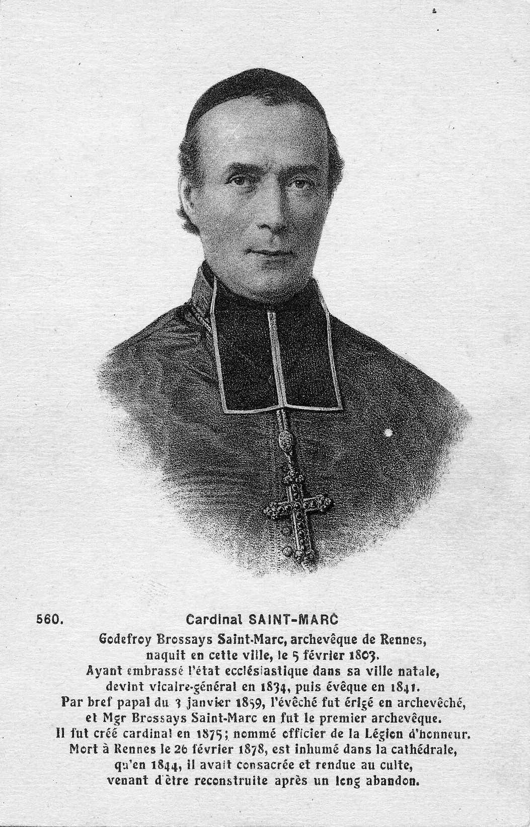 Portrait de Godefroy Brossay-Saint-Marc (1803-1878), archevêque de Rennes. Carte postale F. Château, conservée aux Archives de Rennes, 100 Fi 472